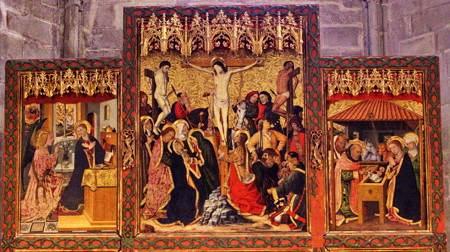 Capella Reial de Santa Àgata (Barcelona). Retaule del Conestable, obra de Jaume Huguet (1464-1465). Tremp sobre taula (673 x 368 cm)